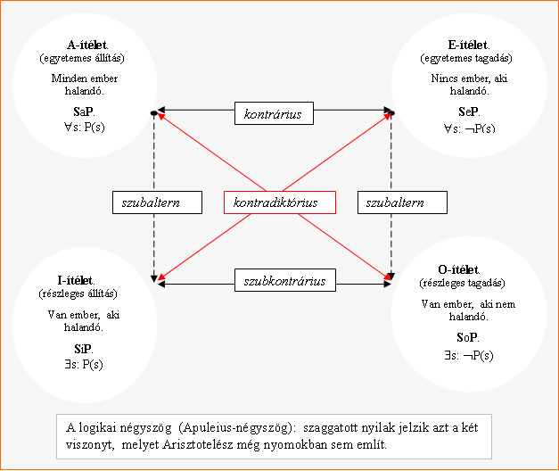 Apuleius-négyszög: konvertált, javított és tisztított verzió